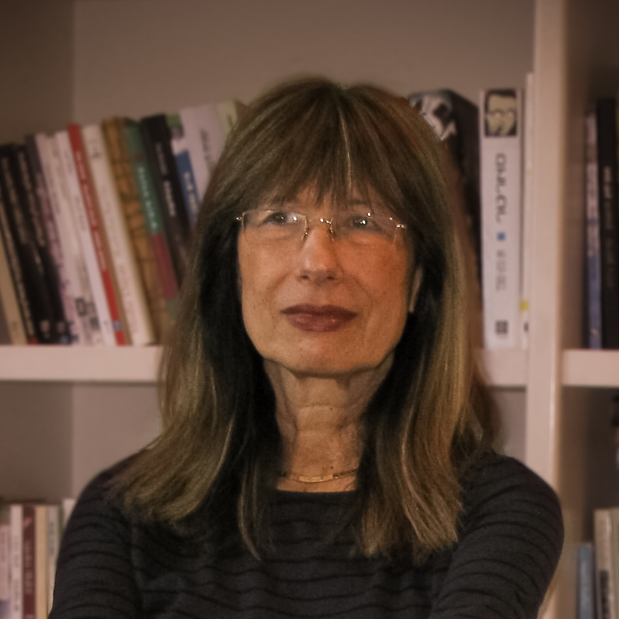 נילי כהן - פרופסור למשפטים באוניברסיטת תל אביב